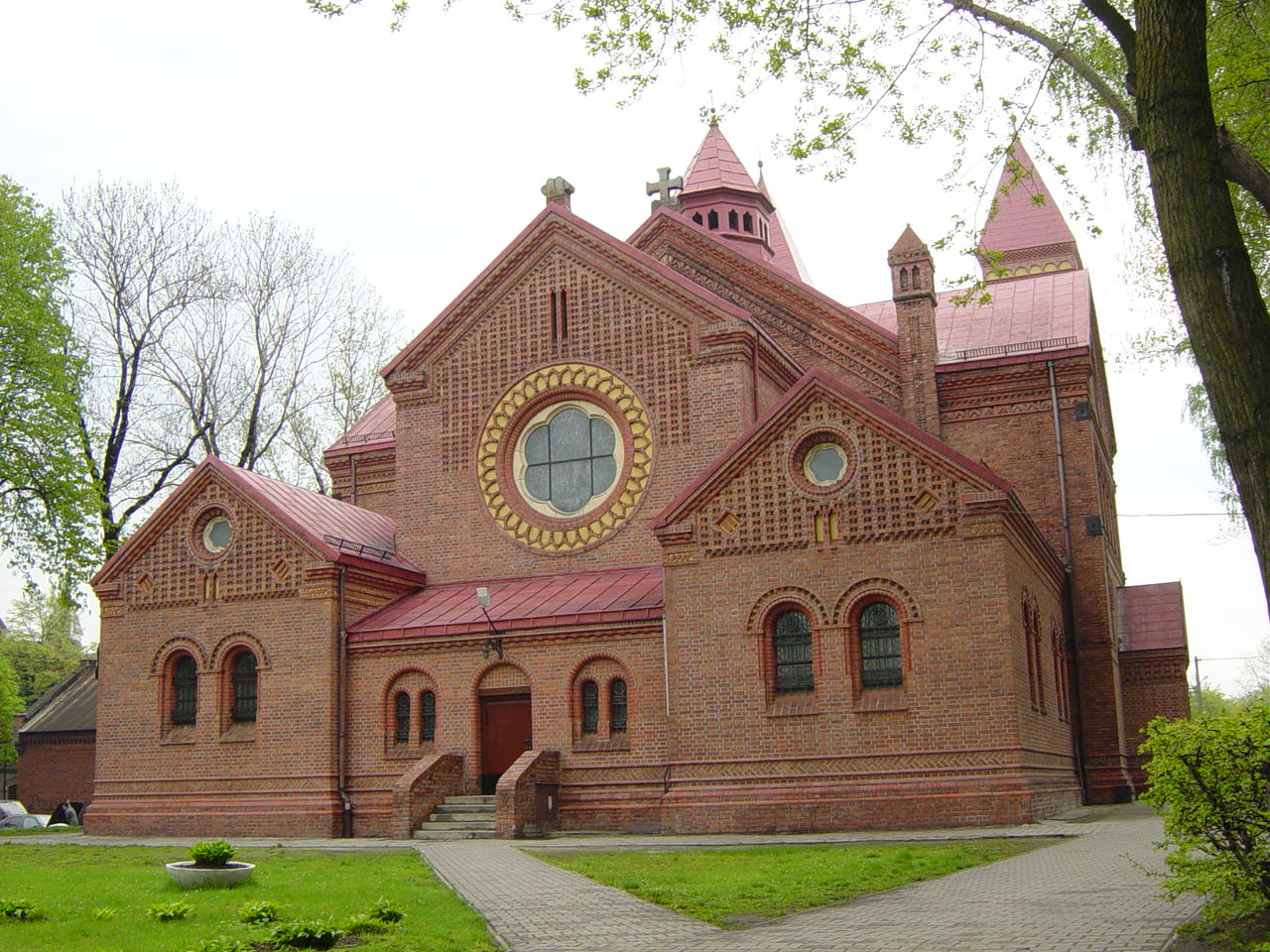 Kościoł św. Michala Archanioła w Orzegowie, Ruda Śląska